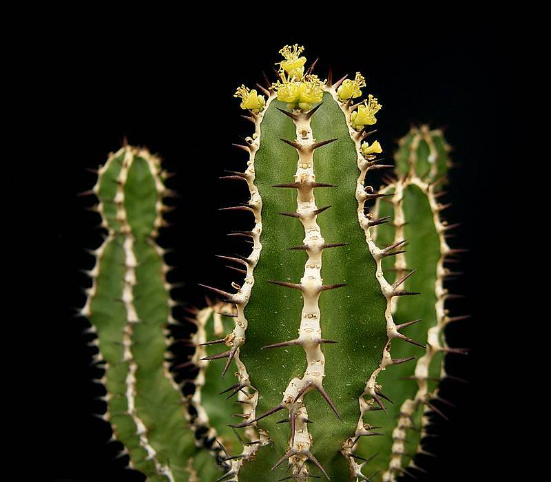 Euphorbia graniticola